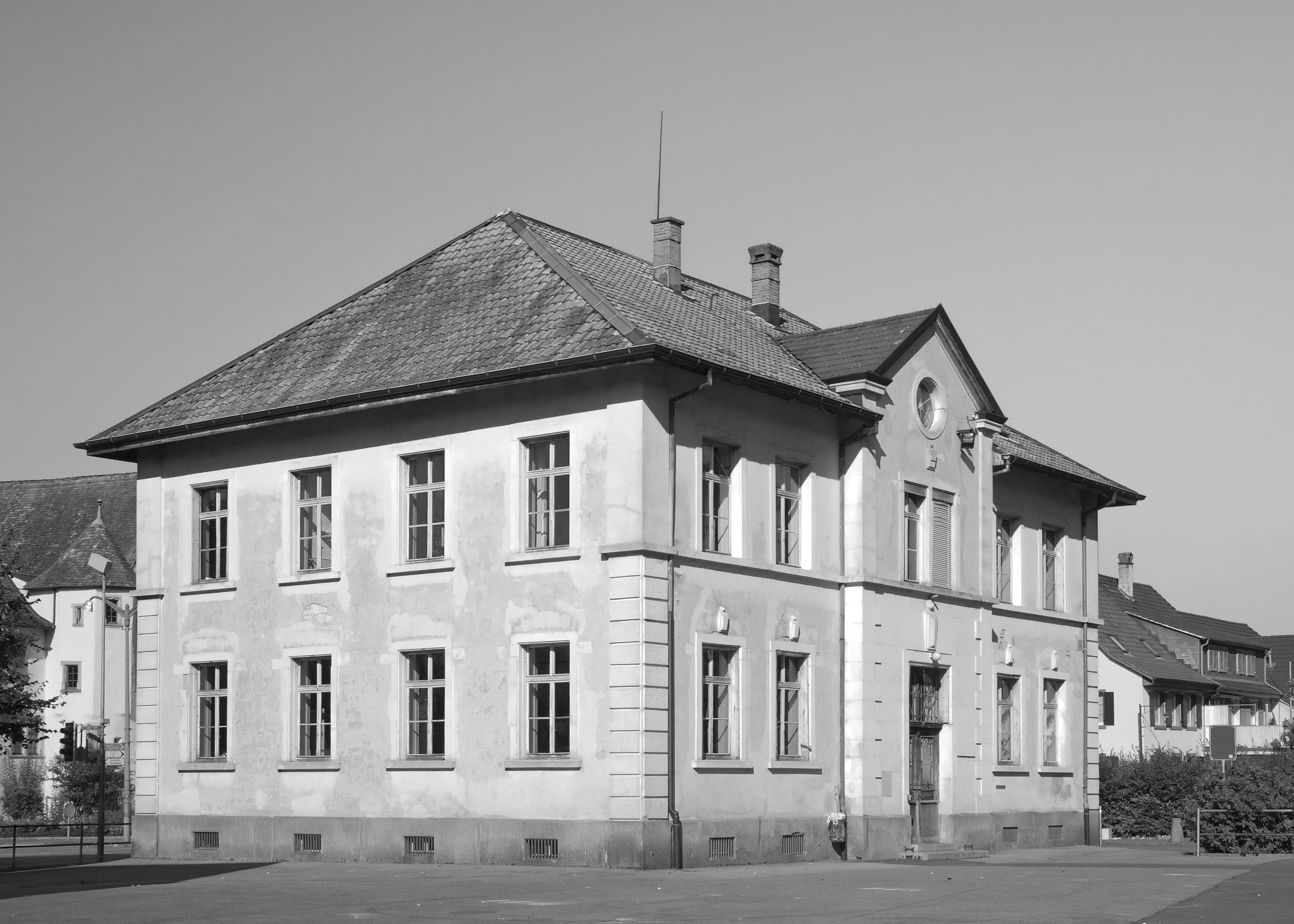 Altes Schulhaus Burggarten (1898) in Pratteln